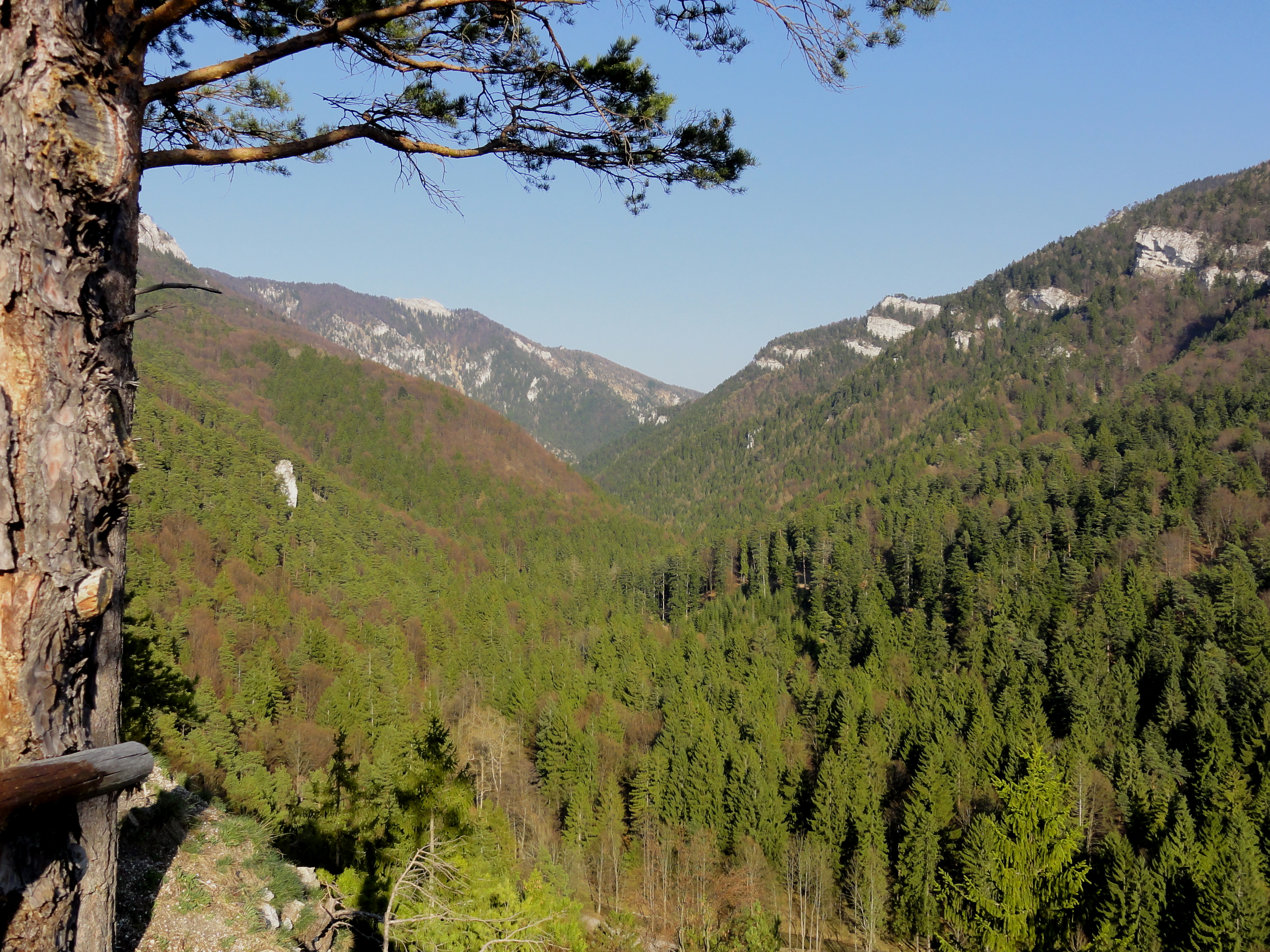 Gaderská dolina, Slovensko, 2014